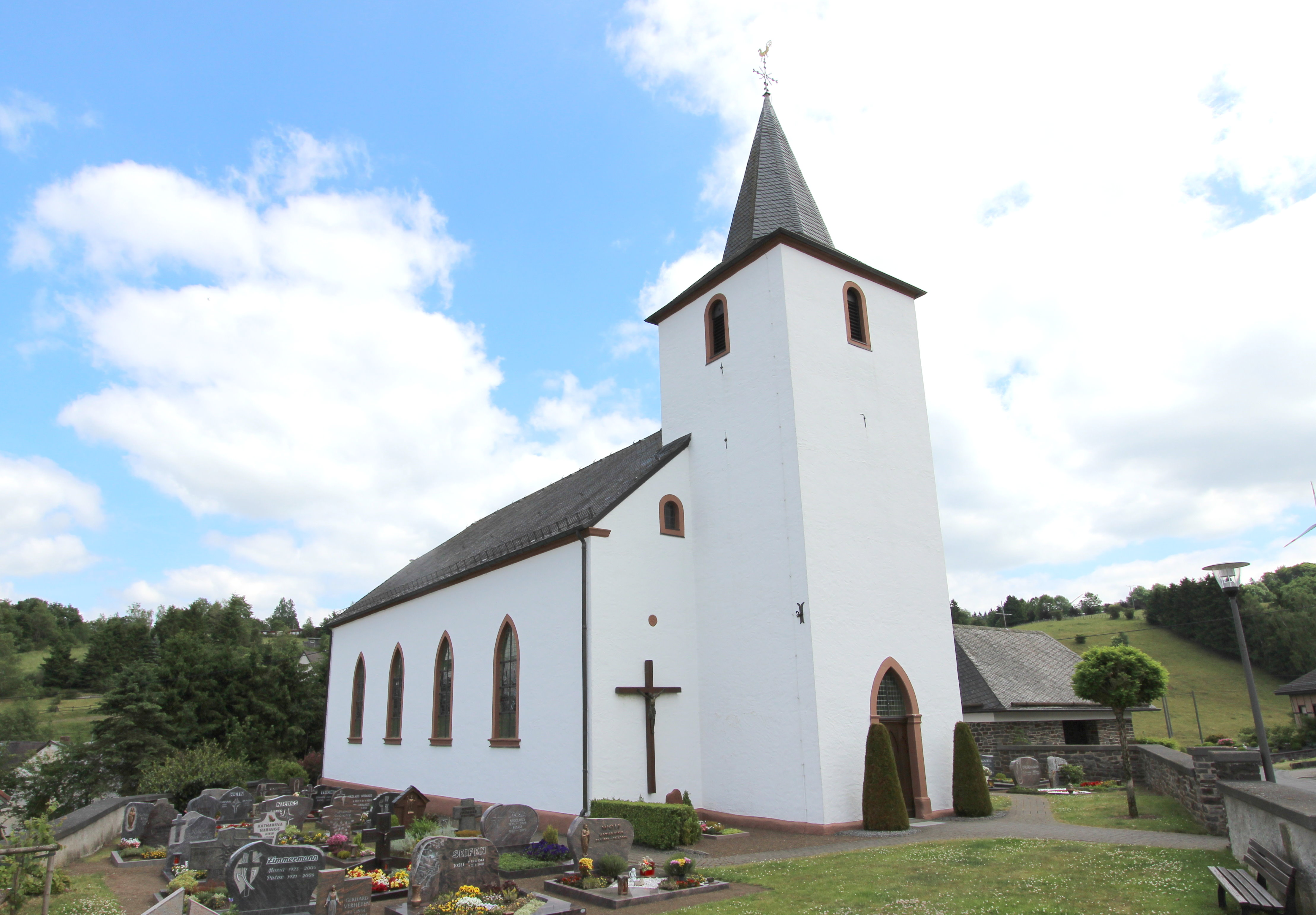 54597 Ormont, Kirchweg 1. Neugotischer Saalbau, 1850. Aufnahme von 2017.